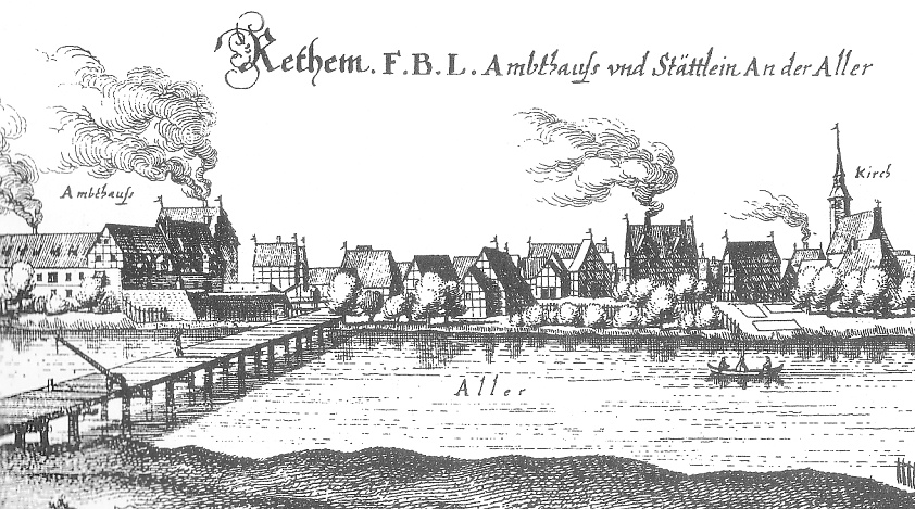 Rethem von Merian 1654